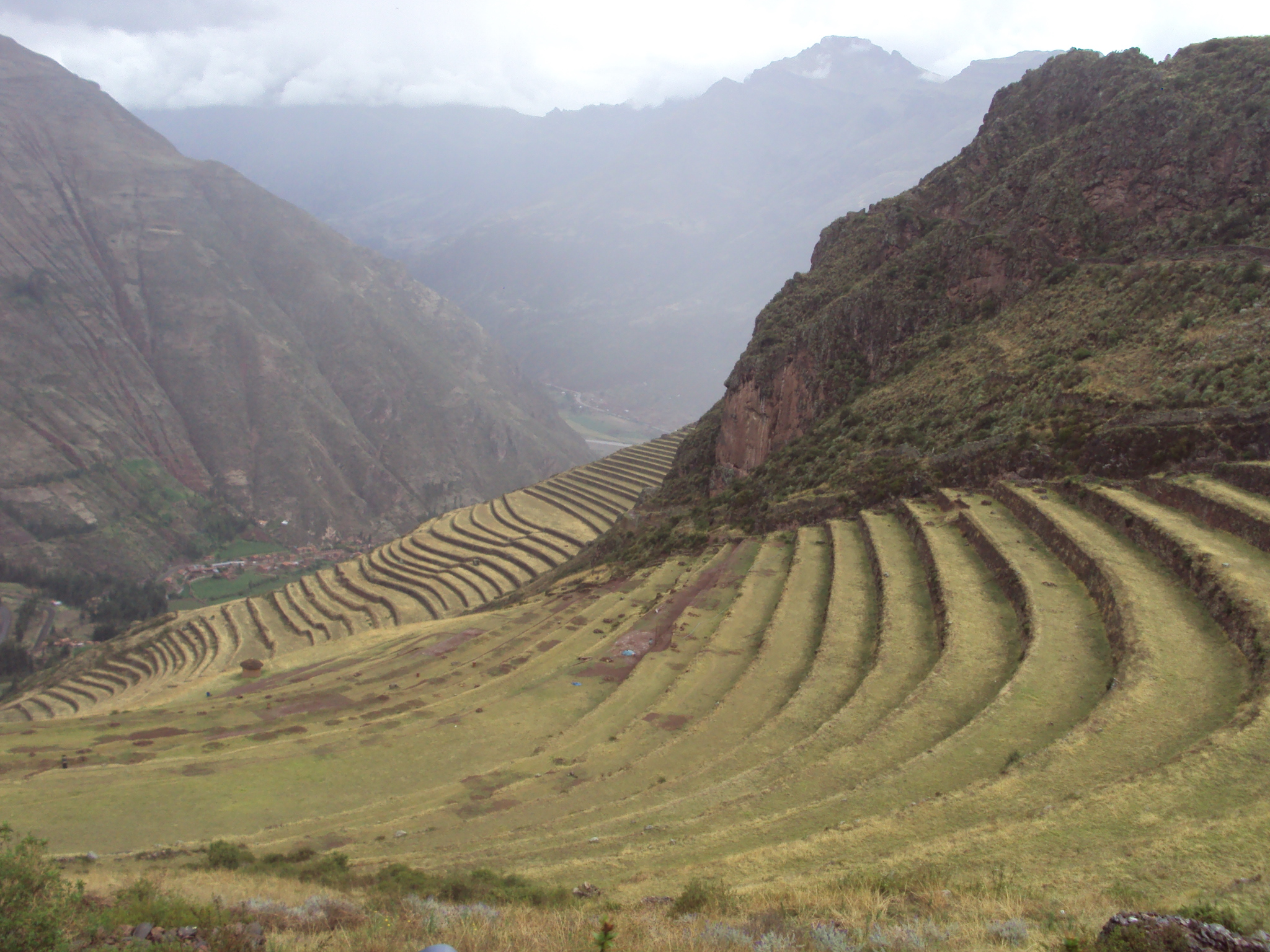 Parque Arqueológico de Pisac, Peru